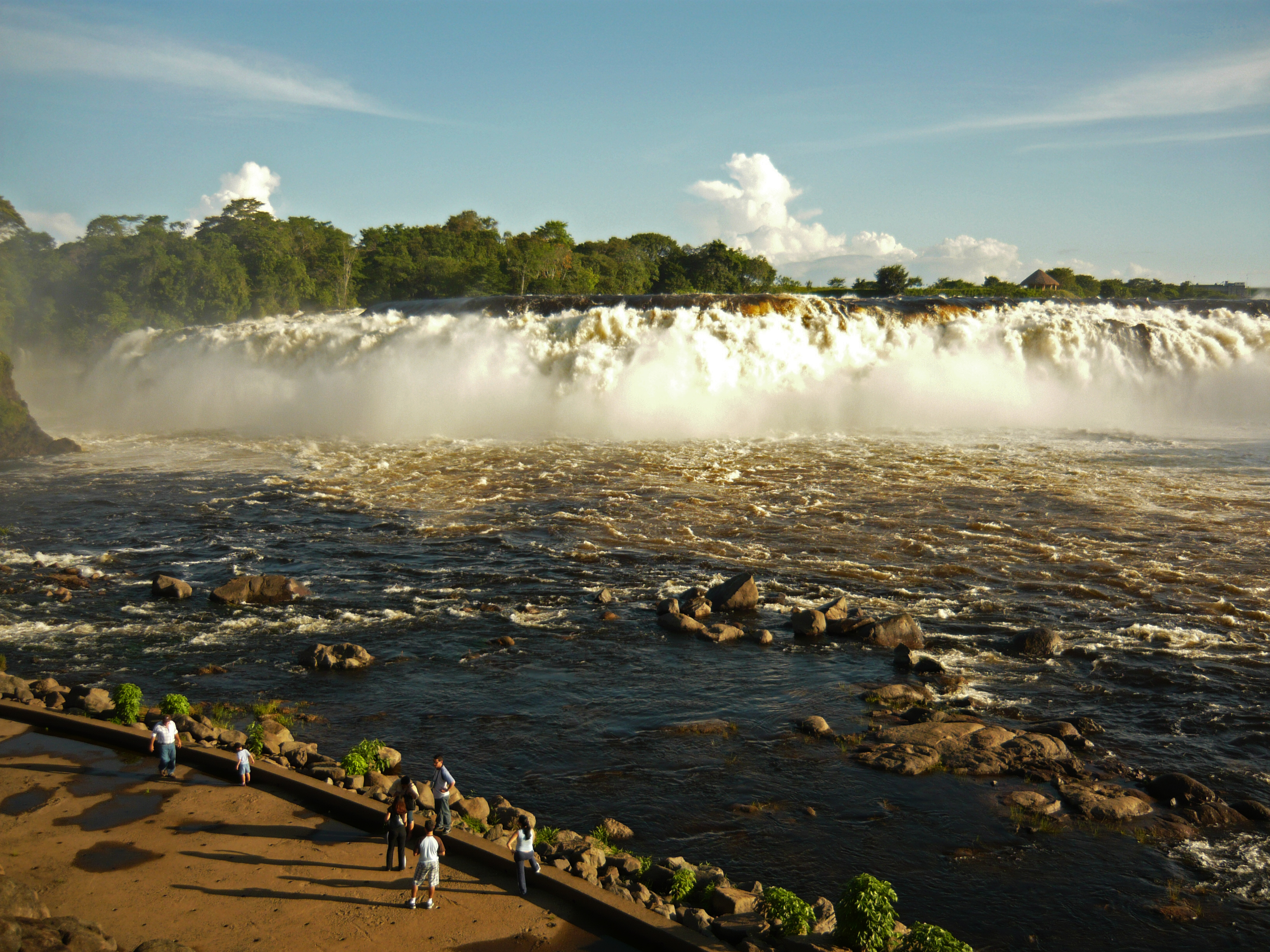 Parque la Llovizna, Puerto Ordaz, Estado Bolívar.